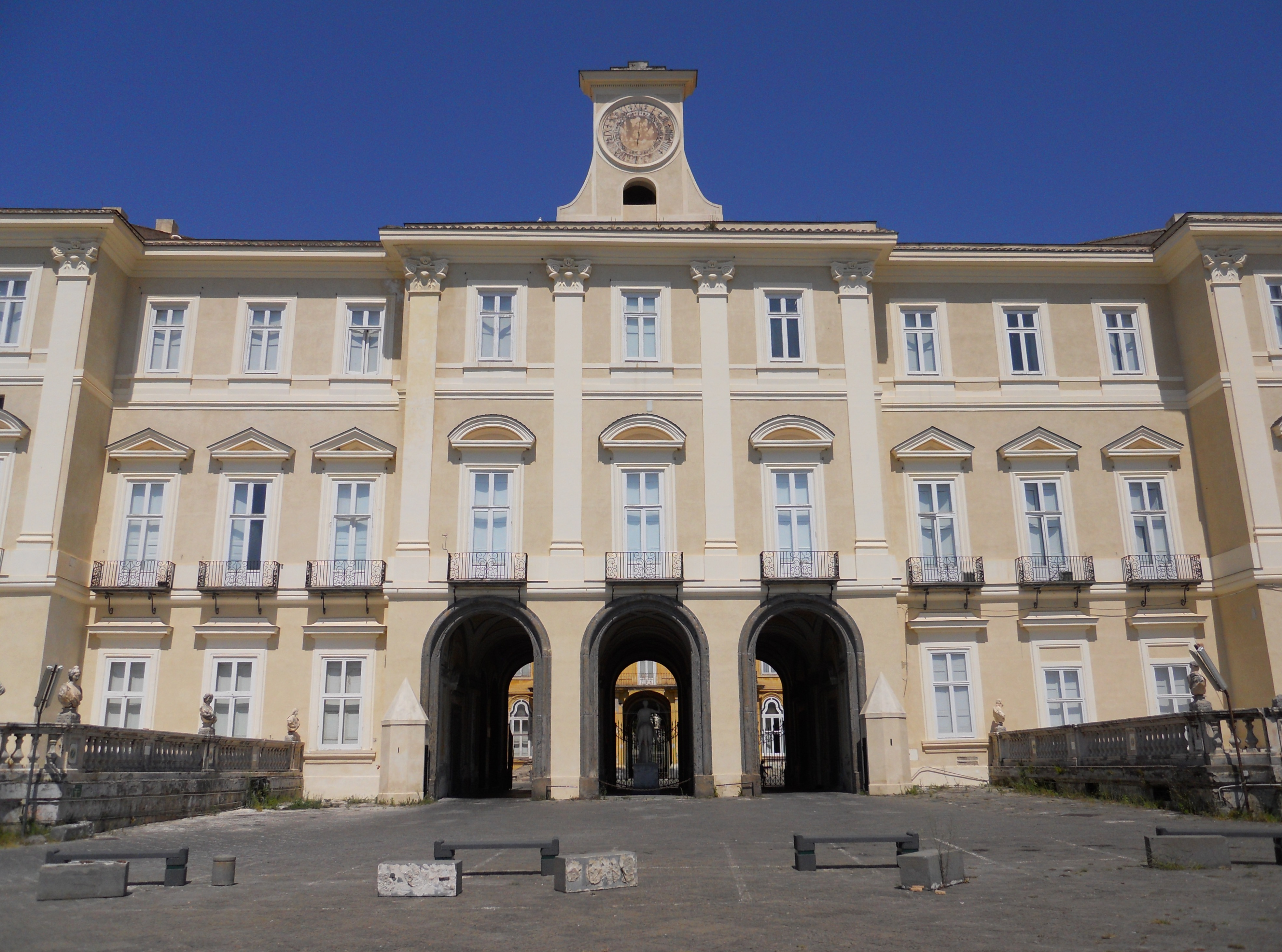 Ingresso della reggia di Portici